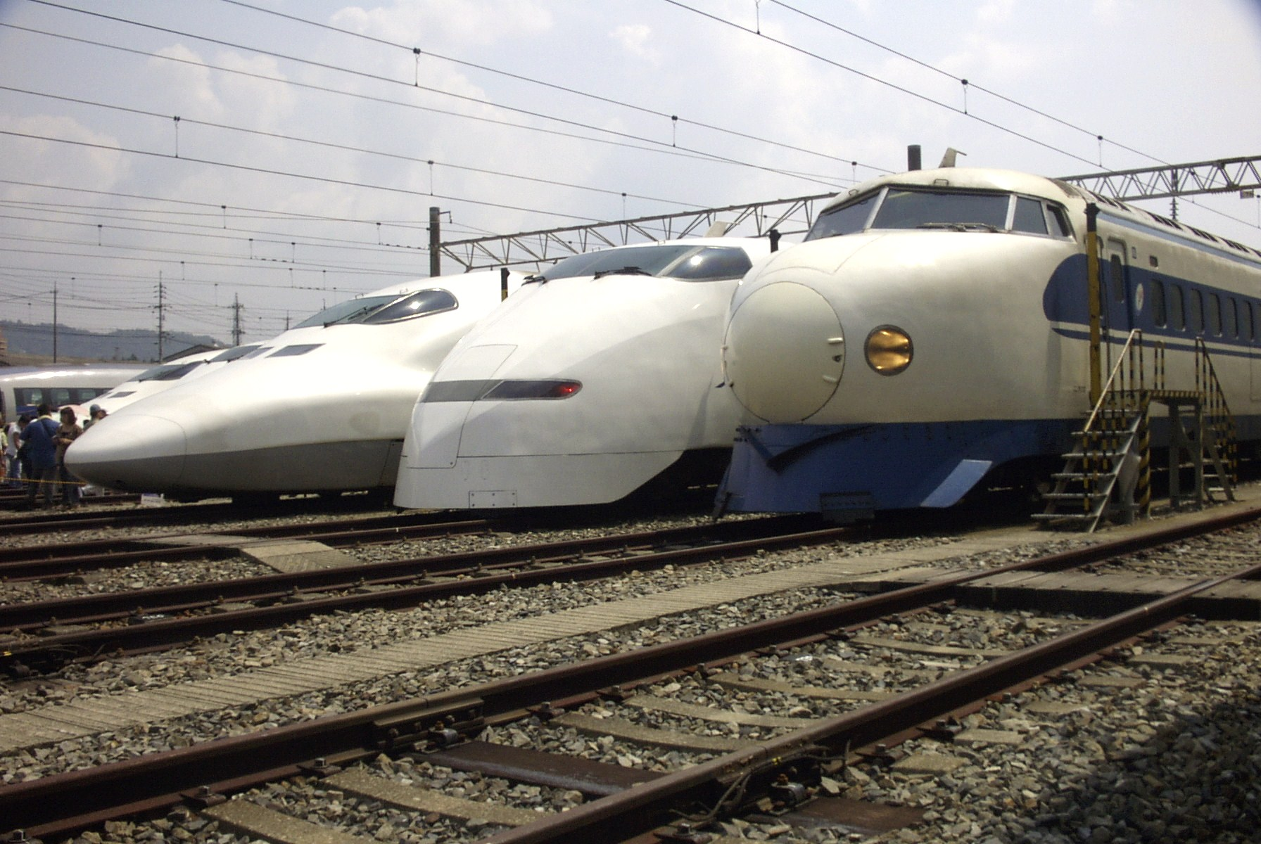 2002年8月26日 本人撮影 新幹線の各形式 Category:新幹線画像